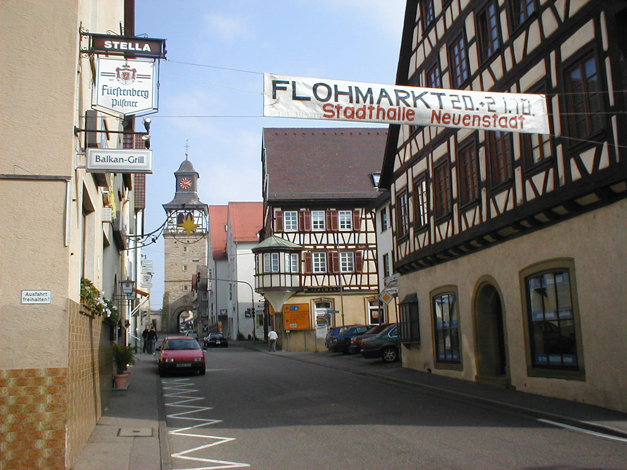 Neuenstadt am Kocher, Blick durch die Hauptstraße zum Oberen Turm. Rechts alte Apotheke mit Portalen aus dem 18. und frühen 19. Jhd.